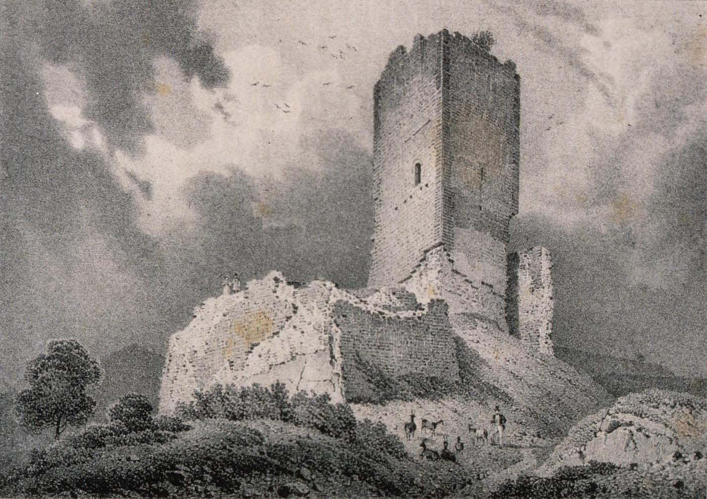 Lithographie der Burgruine Wineck in Katzenthal